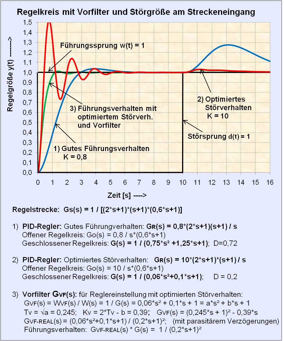 Sprungantwort eines Regelkreises mit Störoptimierung und Führungsoptimierung mit einem Vorfilter.